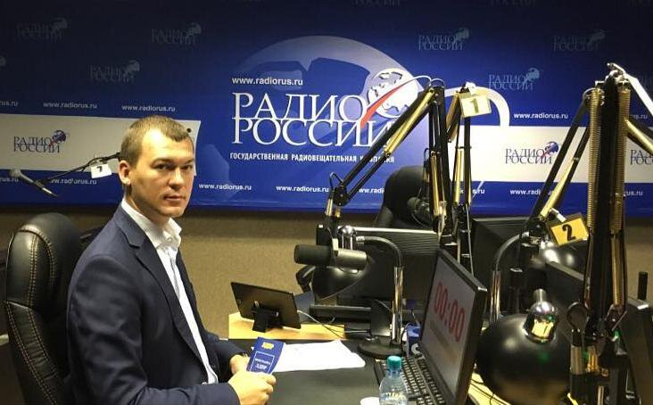 Михаил Дегтярёв в студии «Радио России»